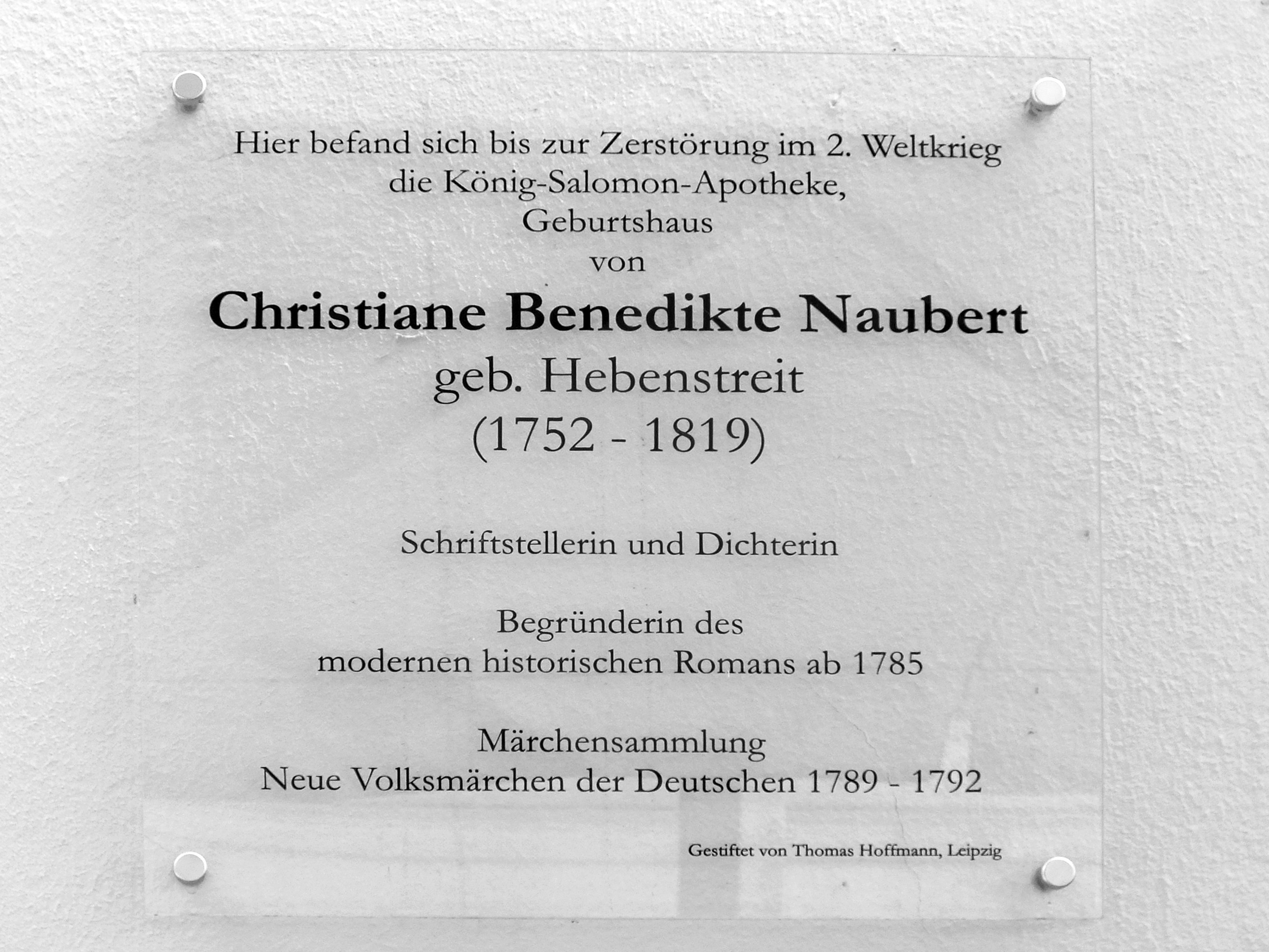 Gedenktafel am Haus Grimmaische Straße 17 in Leipzig